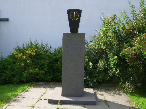 Kulmakivi Tornion 1. kirkon muistomerkki